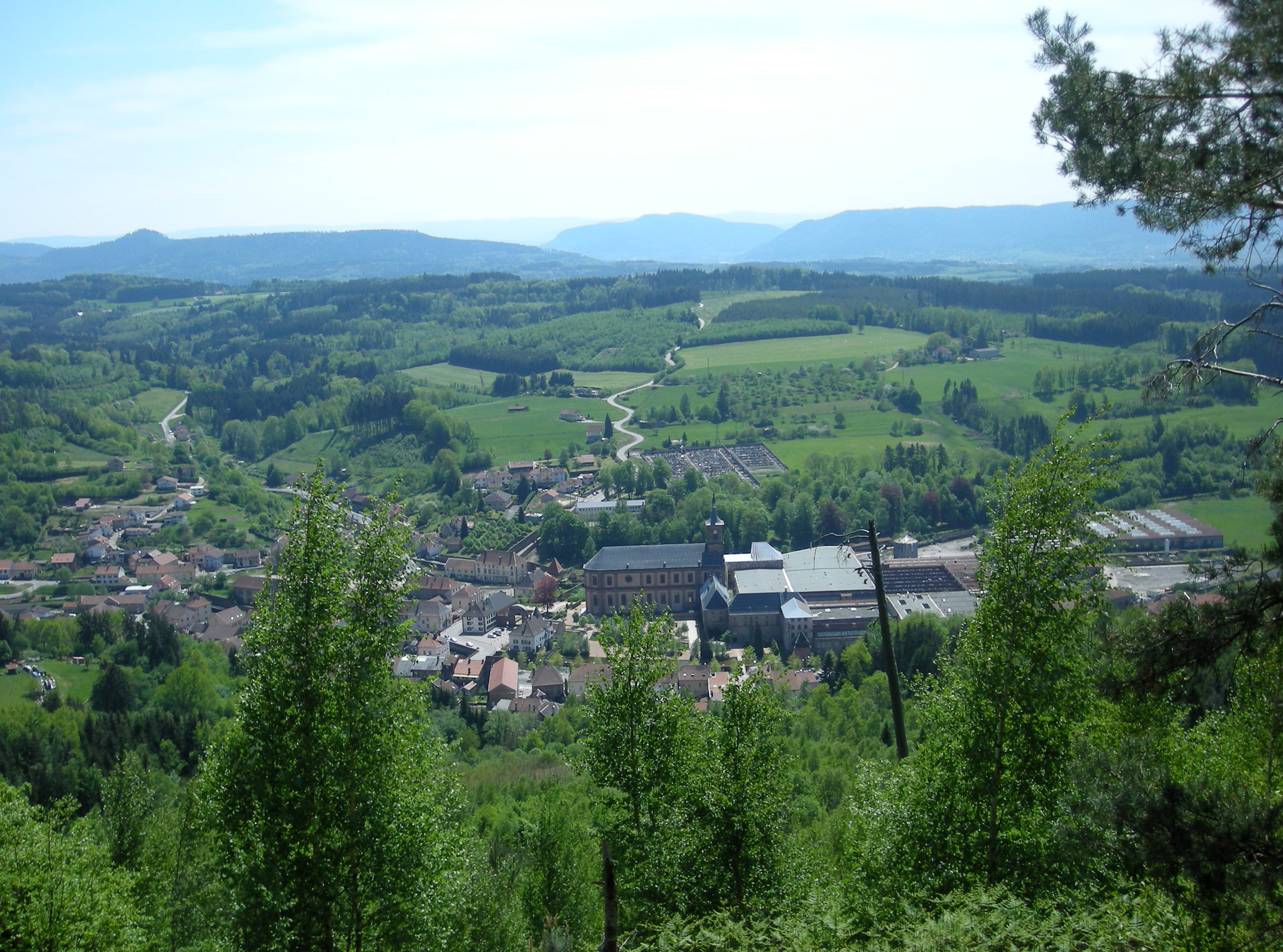 L'abbaye et le centre de Moyenmoutier (Vosges), vus depuis le Sentier des Crêtes